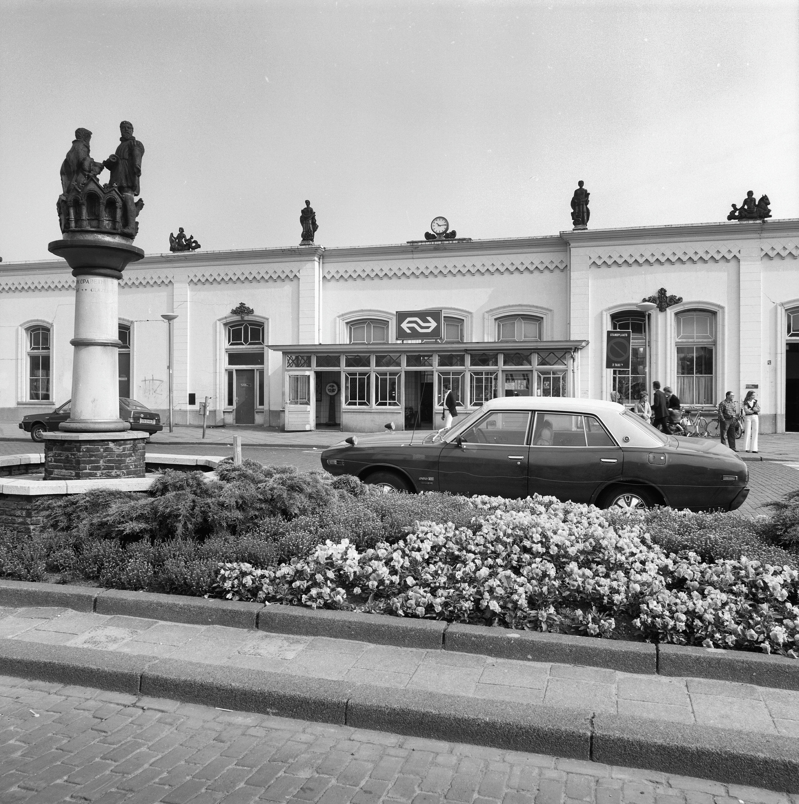 Station N.S.: voorgevel, beeldengroep uit 1949 van Johan Uiterwaal